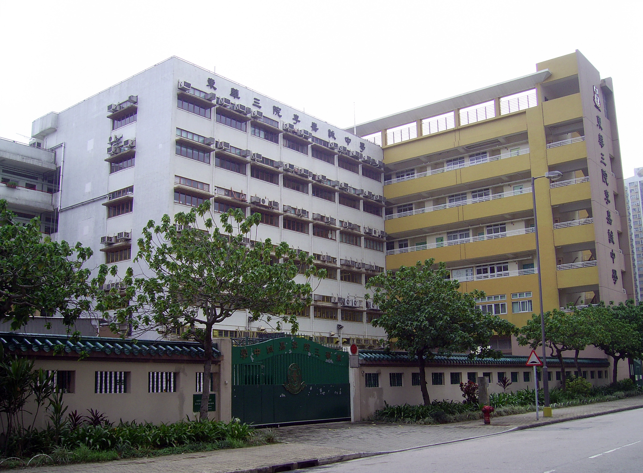 中文（香港）: 東華三院李嘉誠中學